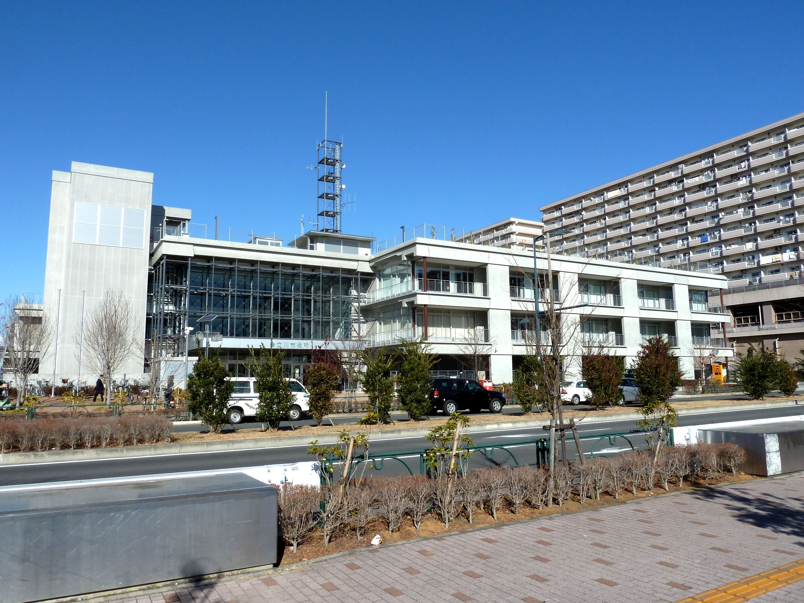 立川市役所